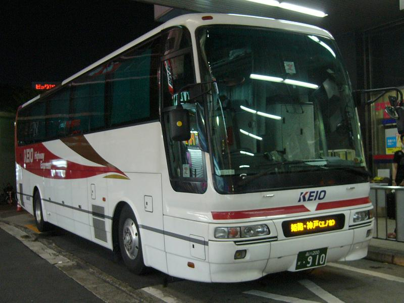 登録番号 品川200か・910 京王バス東所属 夜行用車両 （各系統で共通運用） 三菱ふそう・エアロクィーン KL-MS86MP